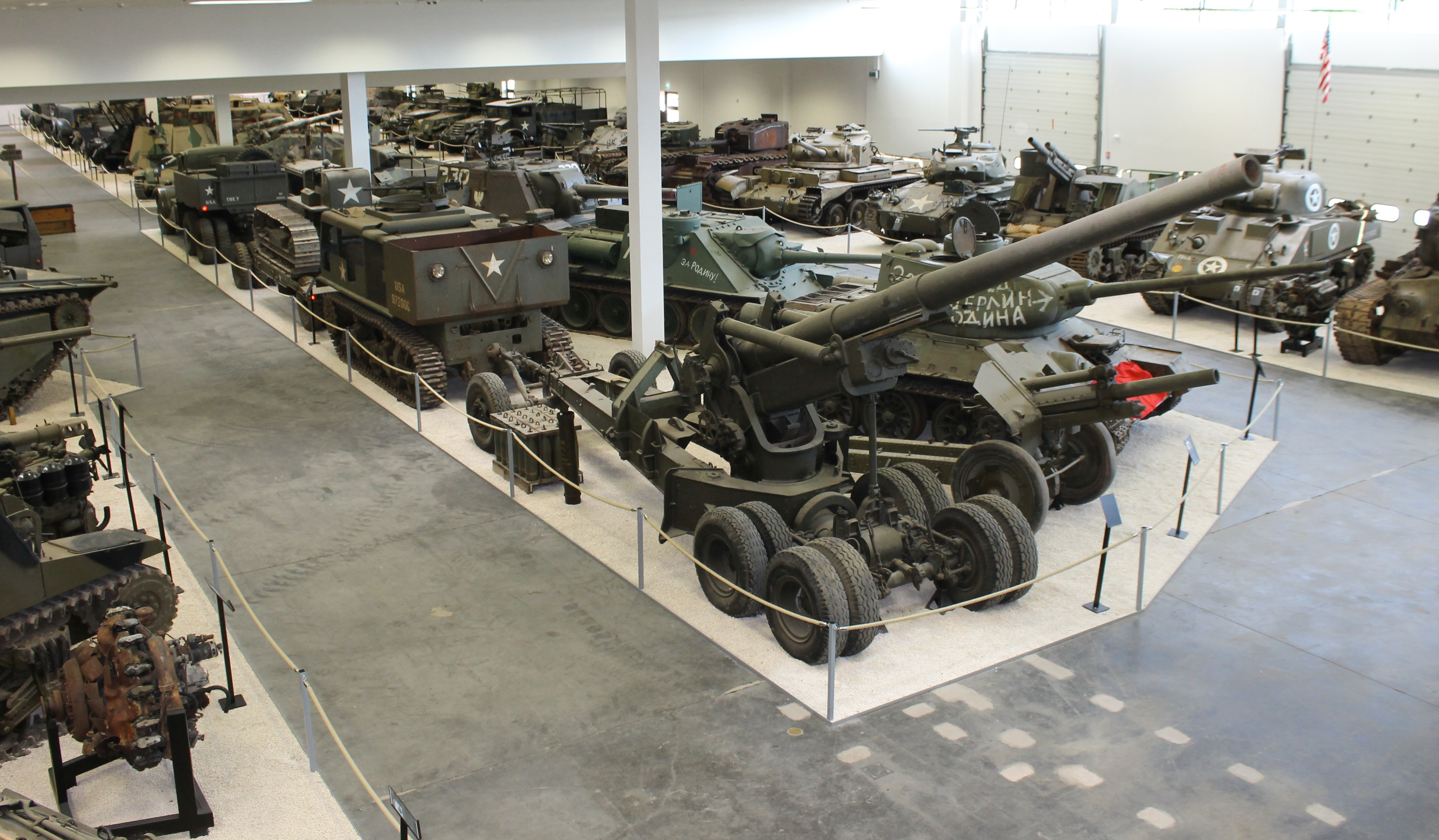 MM Parc France, Fahrzeugpark